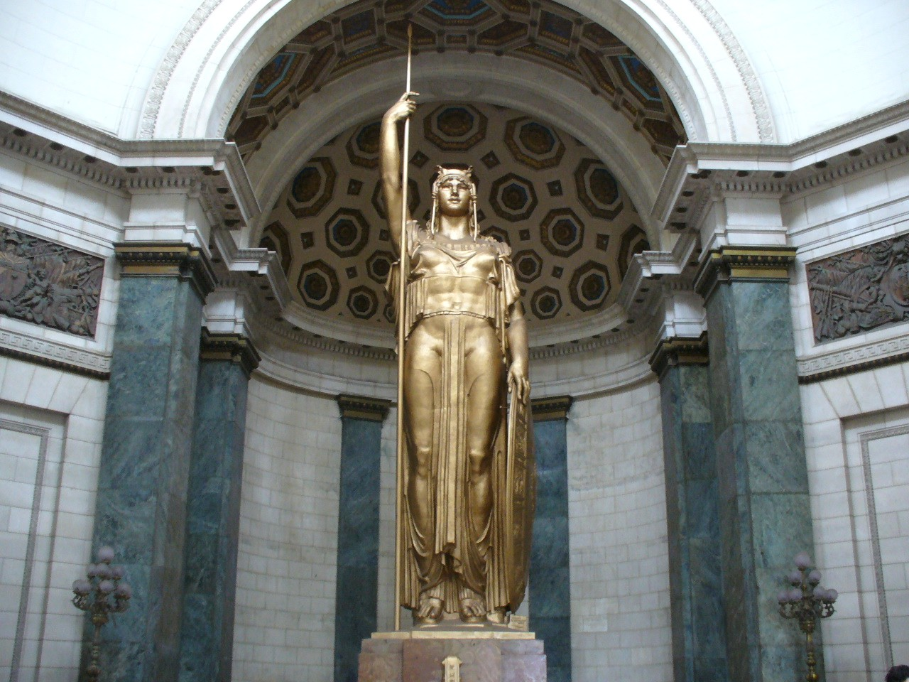 Capitólio - Estátua da República